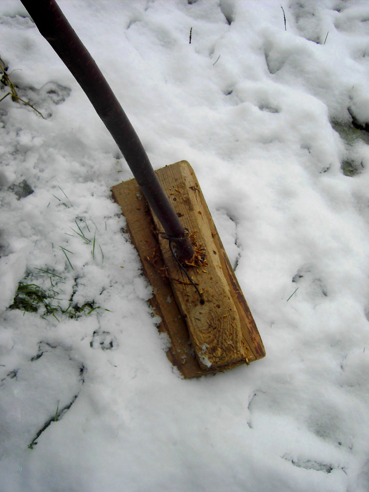 Aragonés: Retavillo.